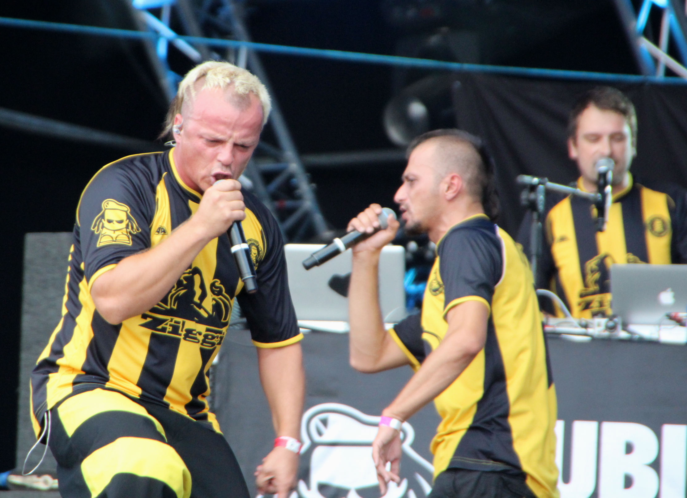 Dubioza kolektiv na Przystanku Woodstock w 2012 r.